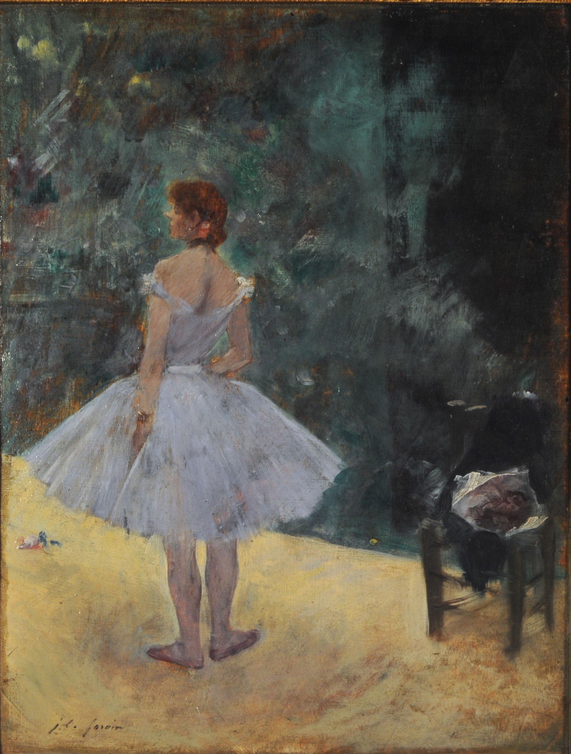 La danseuse (La bailarina)